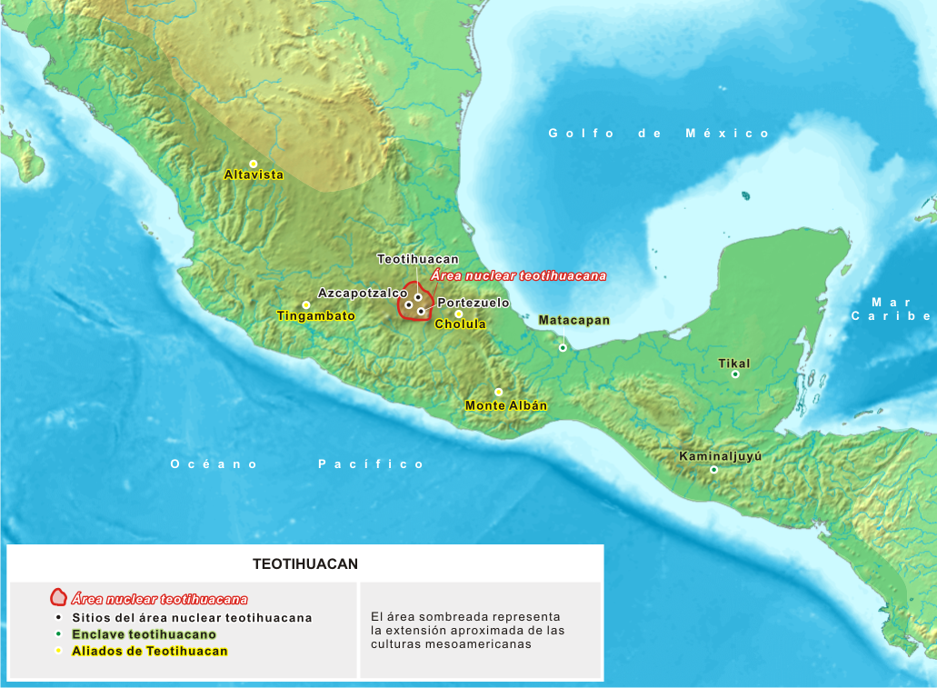 Mapa donde se detallan los sitios asociados a la cultura teotihuacana, del Período Clásico de Mesoamérica.